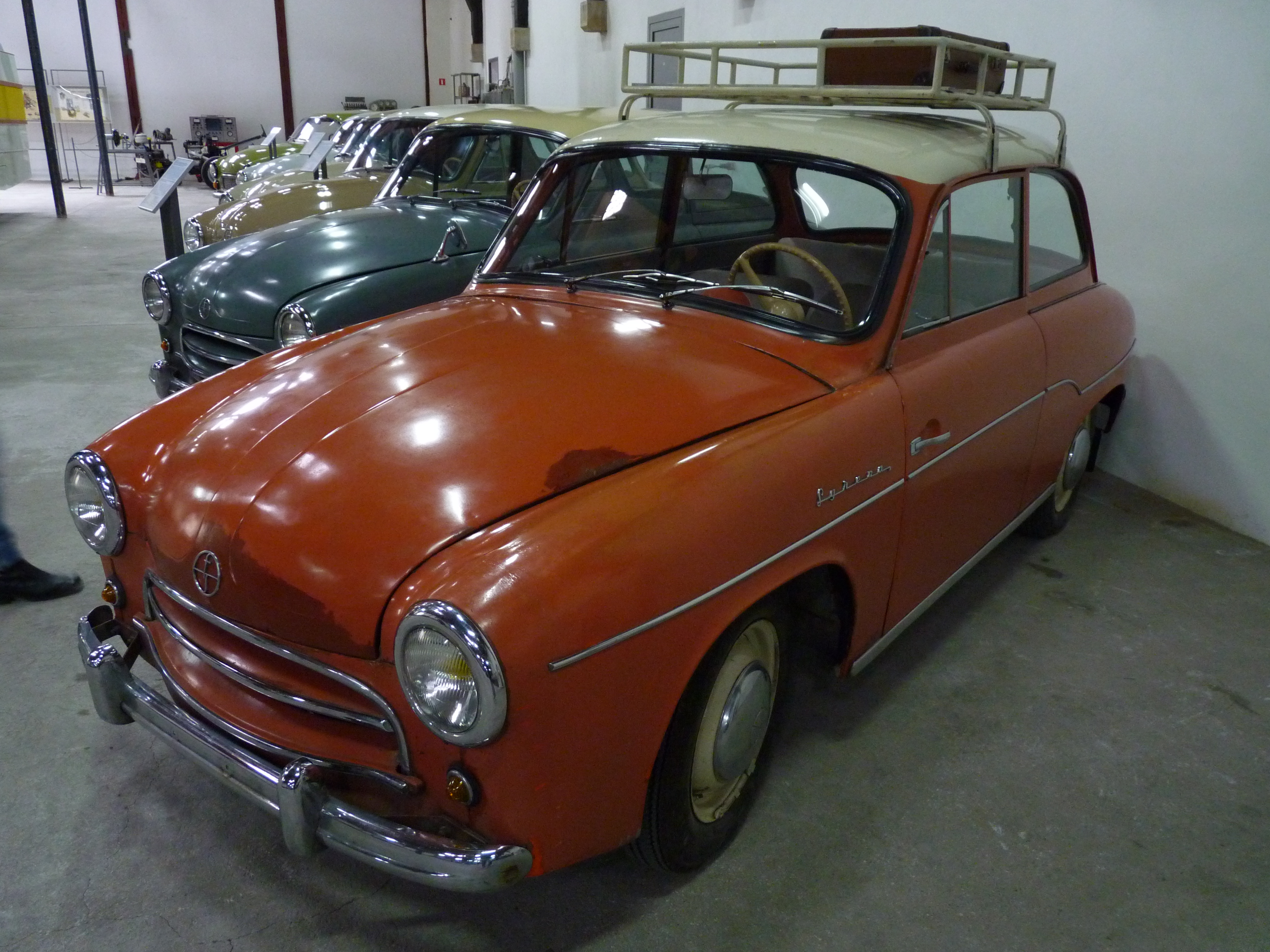 FSO Syrena 101 in Muzeum Inżynierii Miejskiej in Kraków.